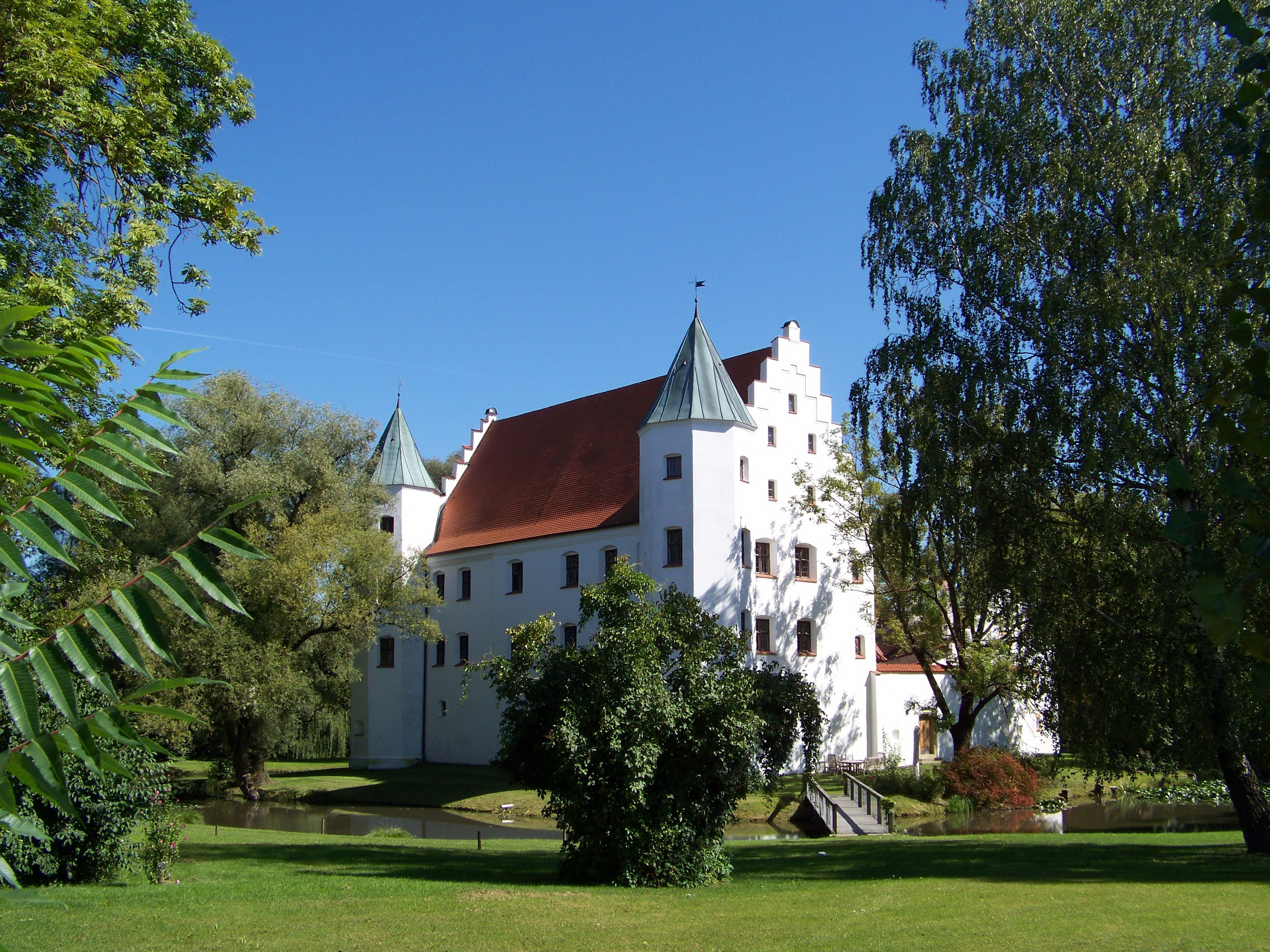 Straßkirchen, Schambach, Amselfinger Straße 4. Schloss, stattliche Zweiflügel-Anlage des 16. Jahrhundert, im Kern 12./13. Jahrhundert; erhalten der Nordwestflügel mit Treppengiebeln, zwei Ecktürmen und einem Treppenturm, auf der Hofseite Arkaden in drei Geschossen; die Untergeschosse des Nordostflügels; Torbau und Hofmauer; Schlossgraben und Park.